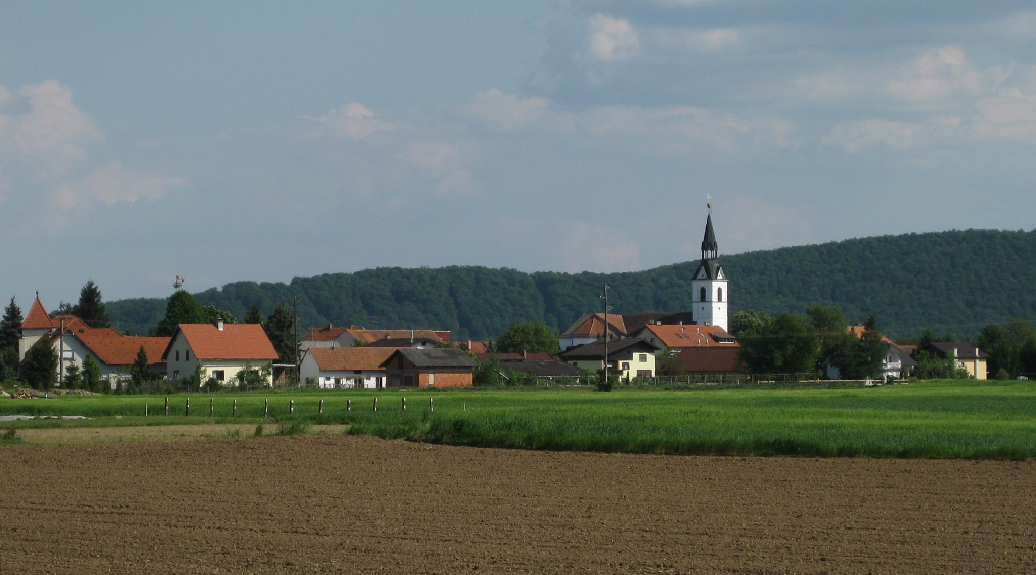 Gorišnica, village in Slovenia